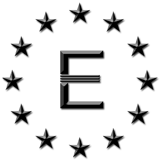 Logo de la facción Enclave de Fallout 3 y Fallout New Vegas